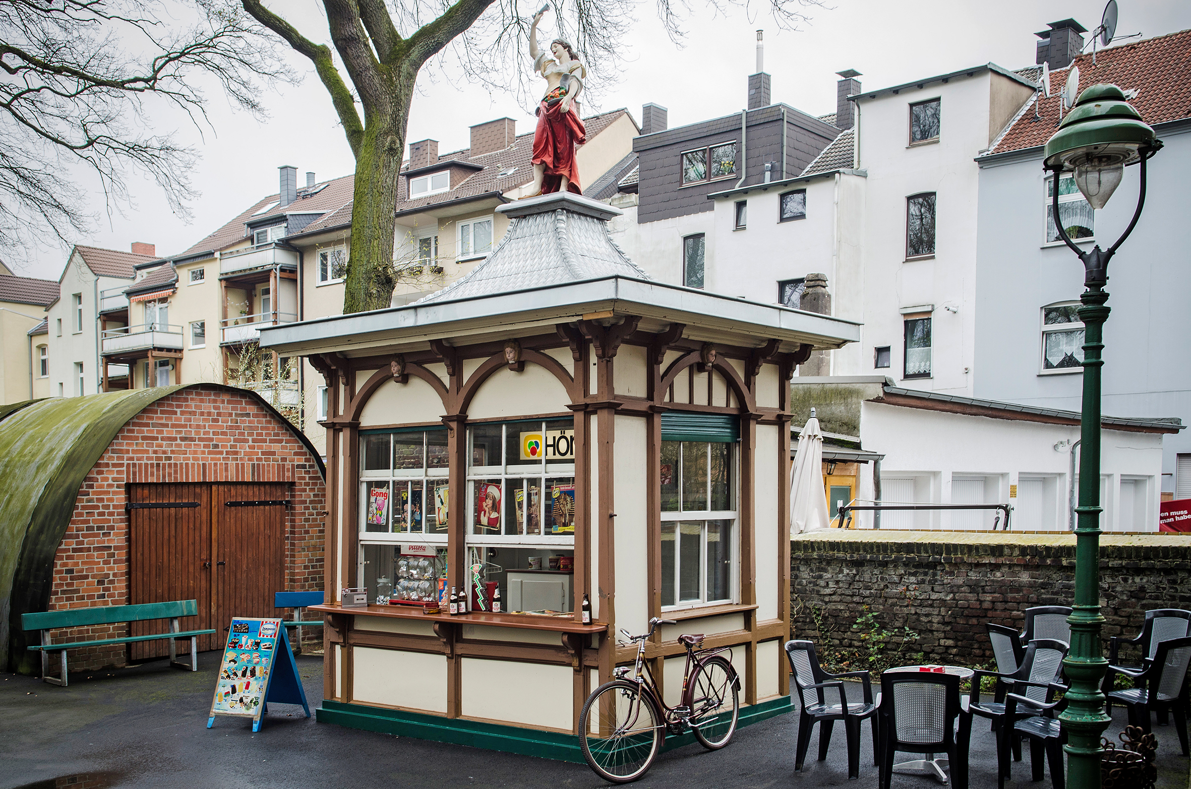 Heimatmuseum Fortuna-Bude